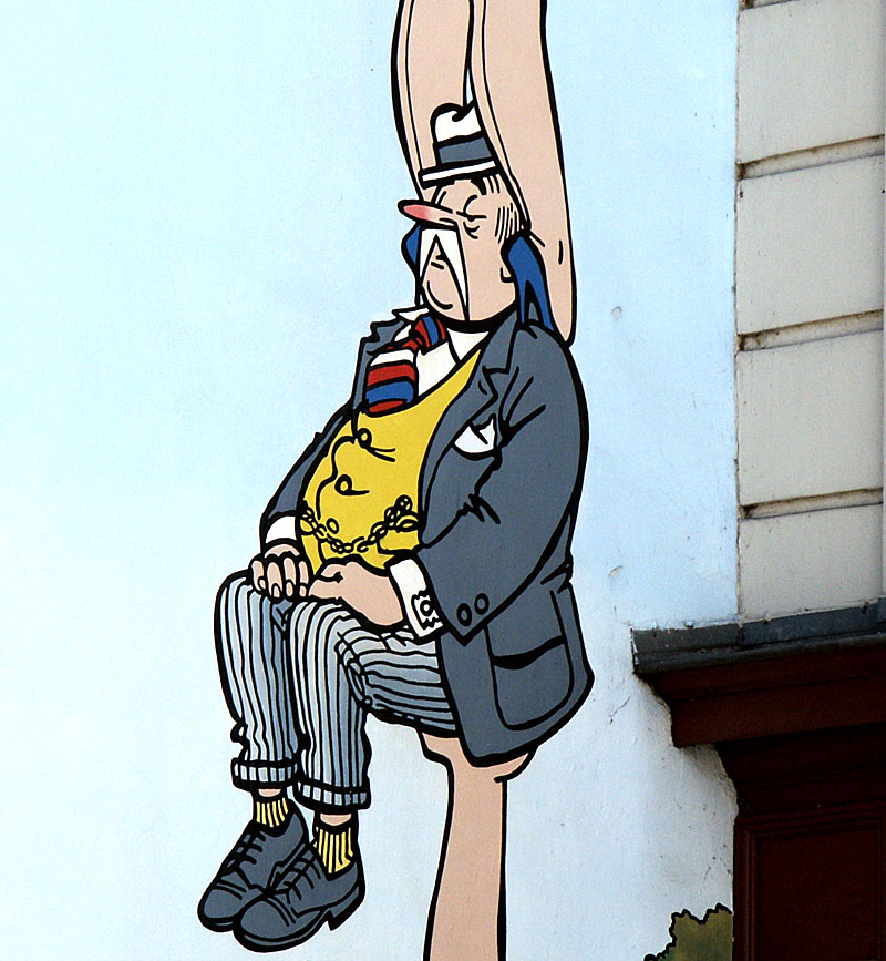 Meneer Pheip op de Nero-muurschildering in Brussel